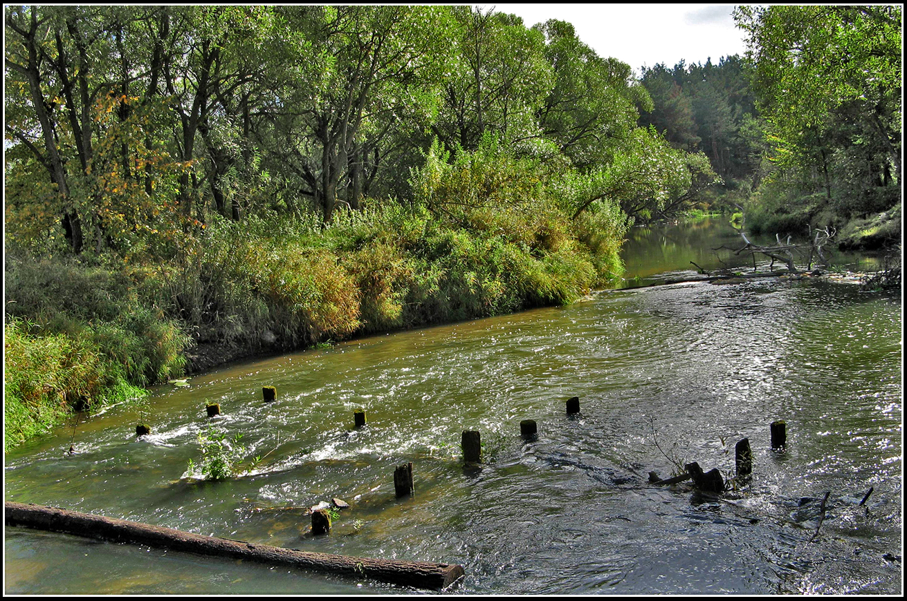 Пекша